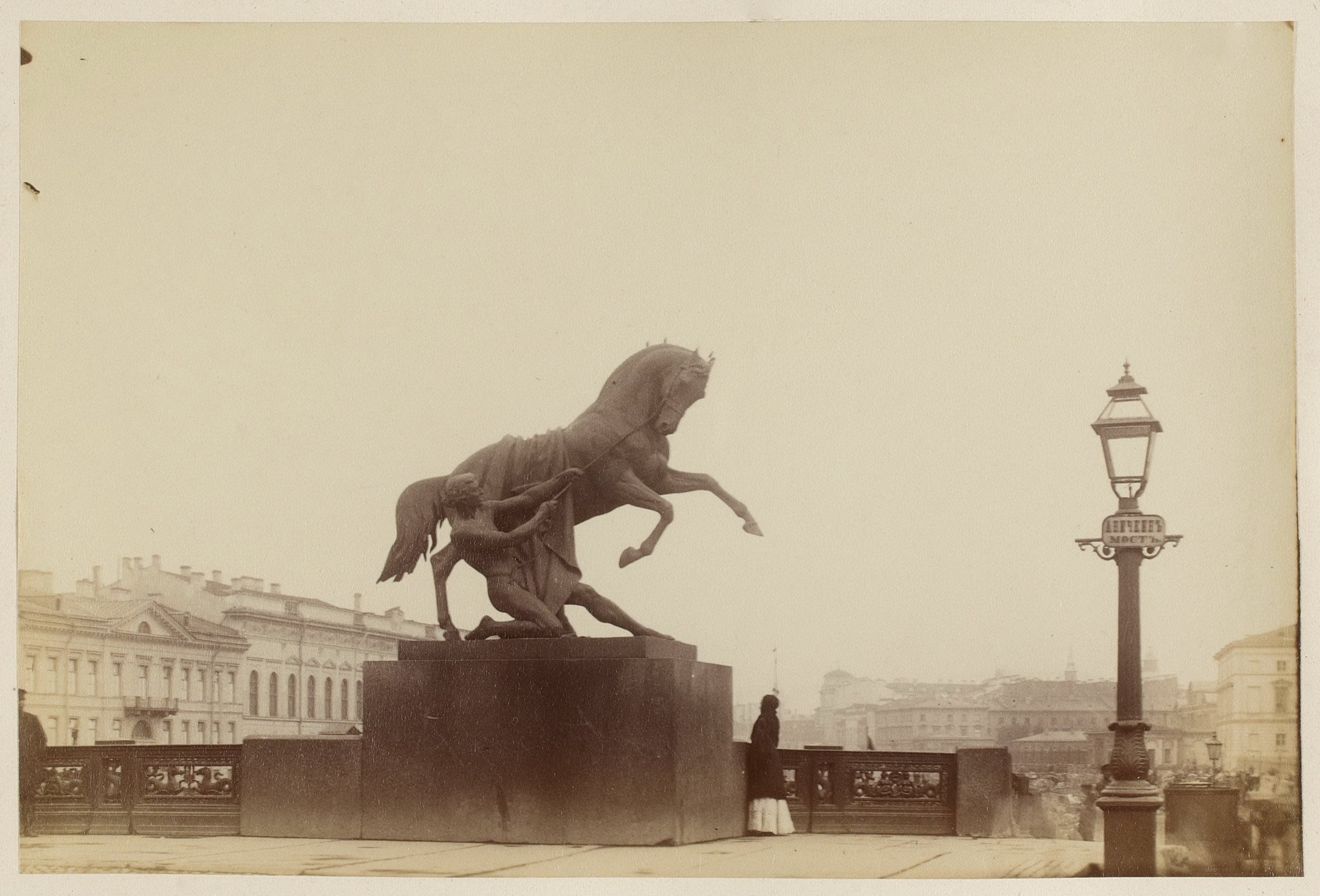 Скуптура Аничкова моста через Фонтанку в Петербурге.